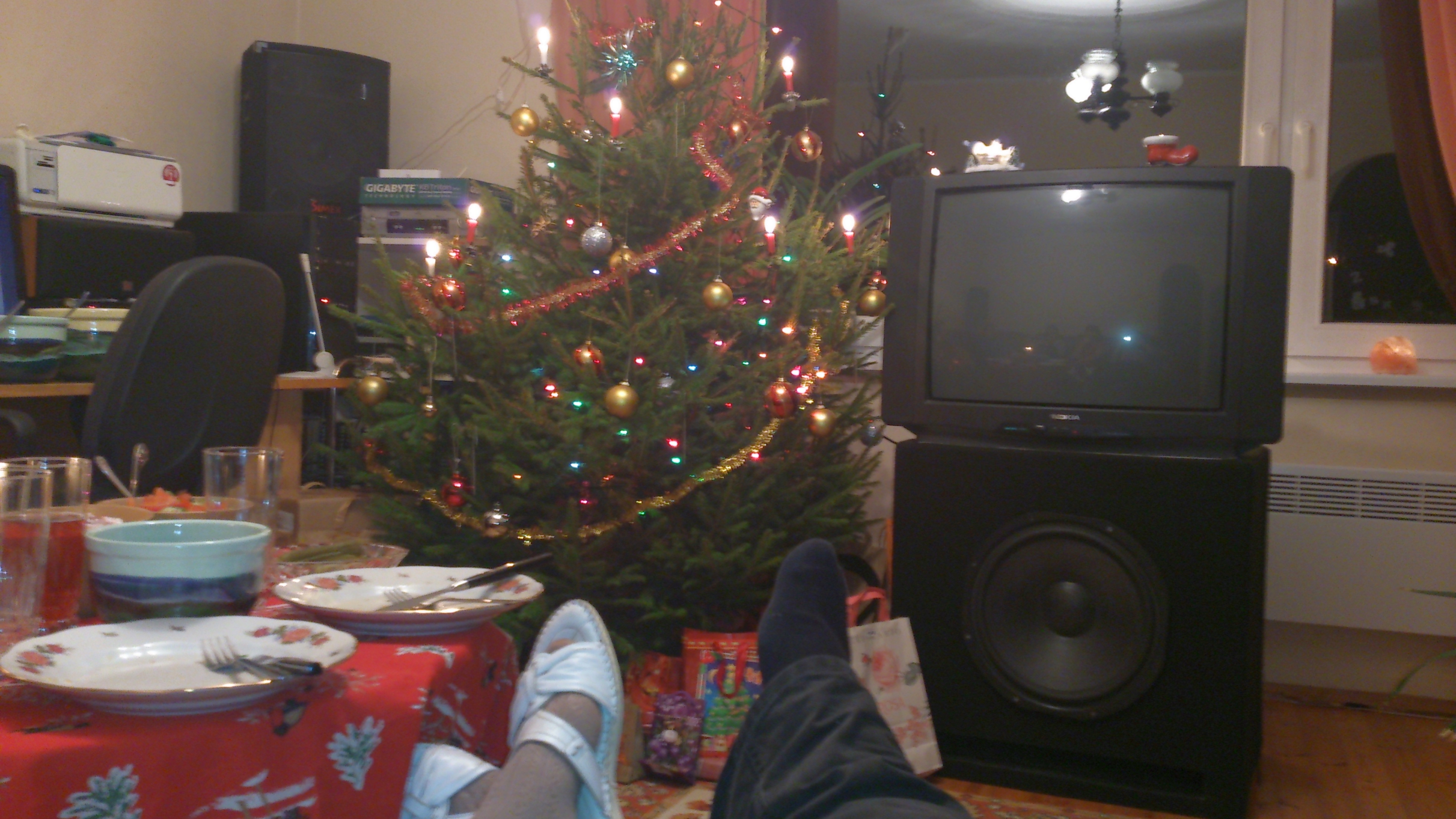 Traditsiooniline Eesti jõul